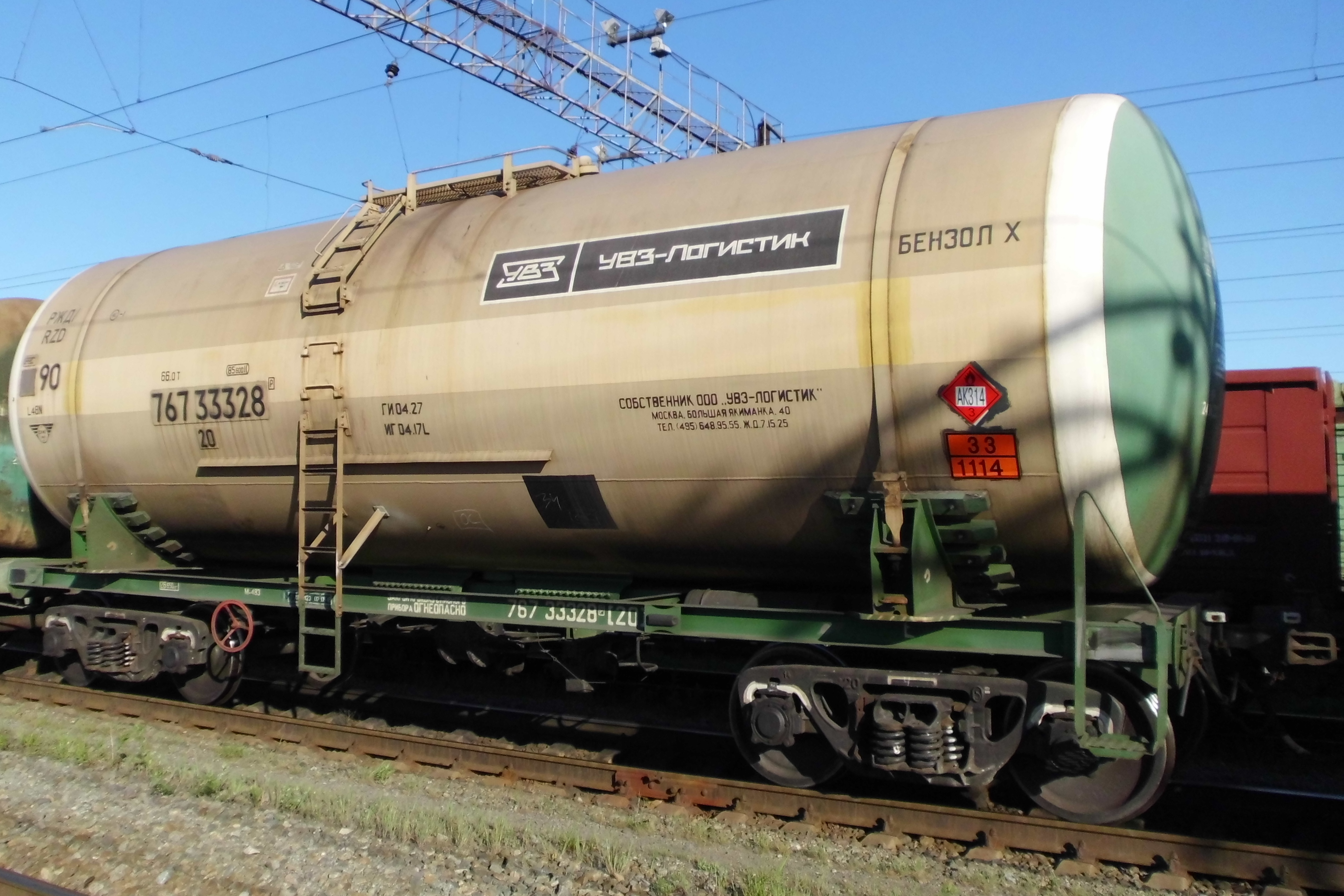 4-х осный вагон-цистерна для бензола. Россия.